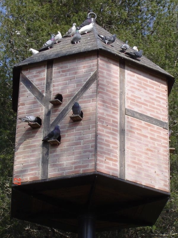 Tuvimaja Saint-Tropez's Lõuna-Prantsusmaal